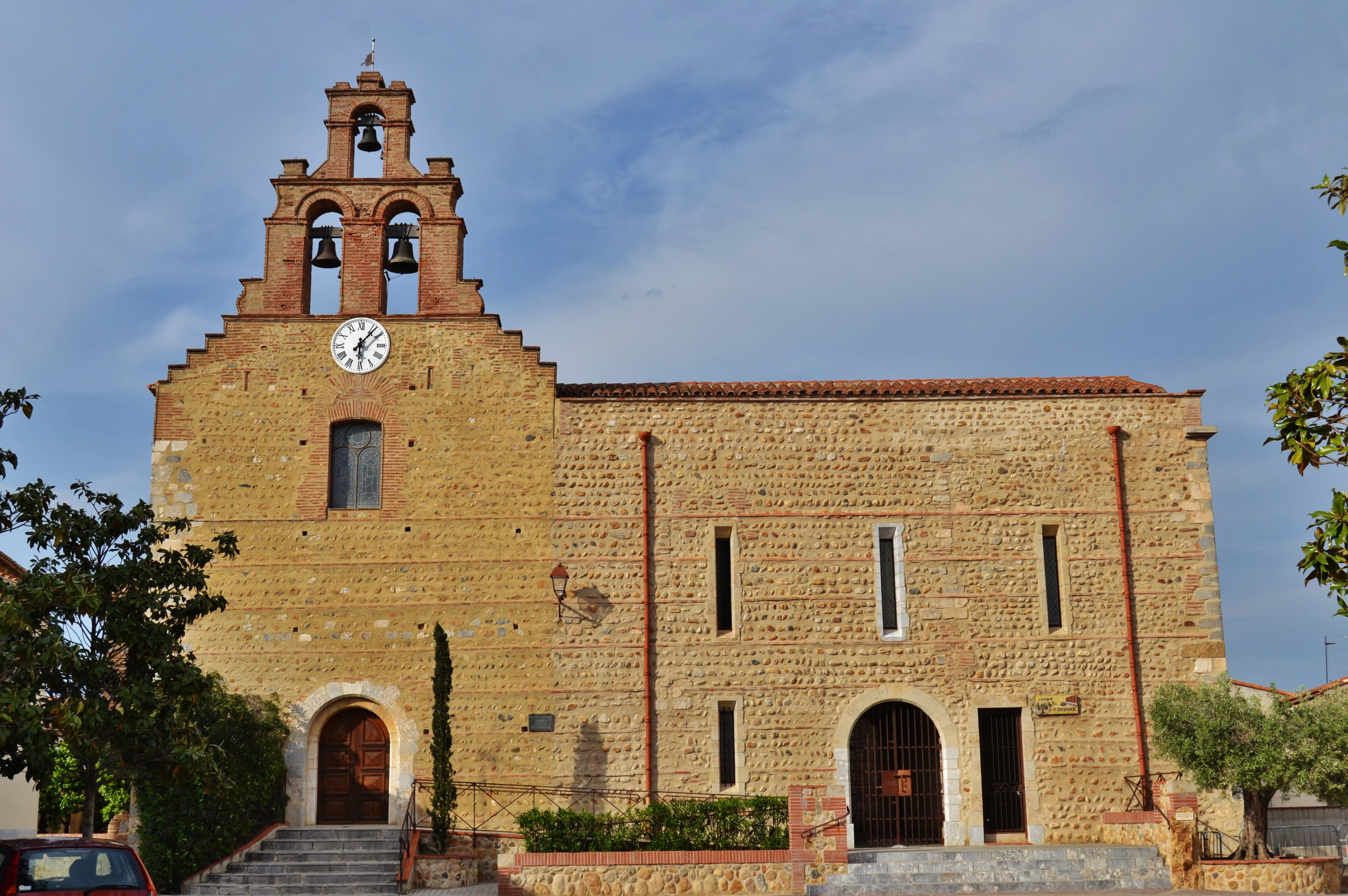 église St Jean